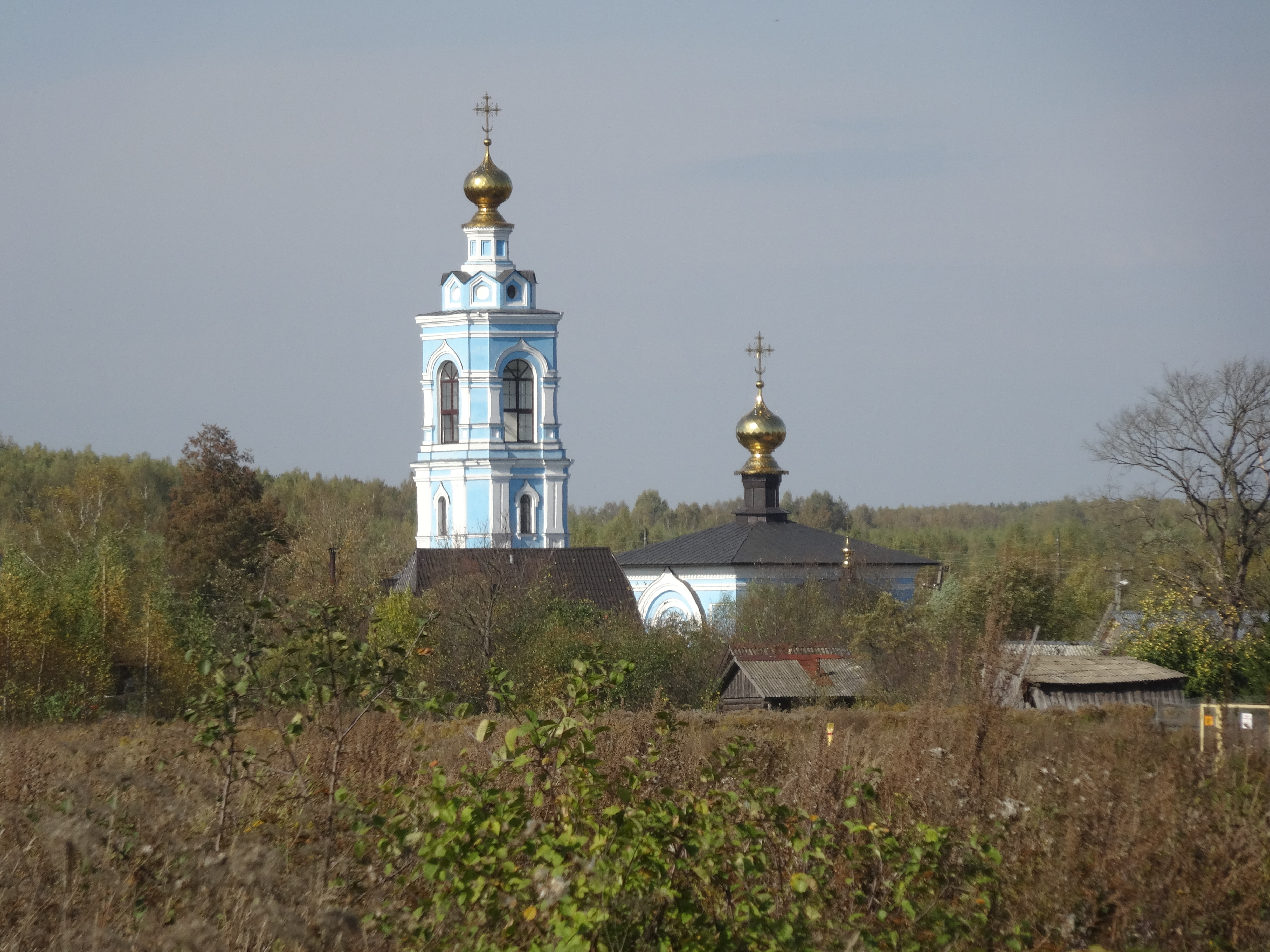 Церковь Бориса и Глеба с колокольней: Ляховицы, Суздальский район, Владимирская область